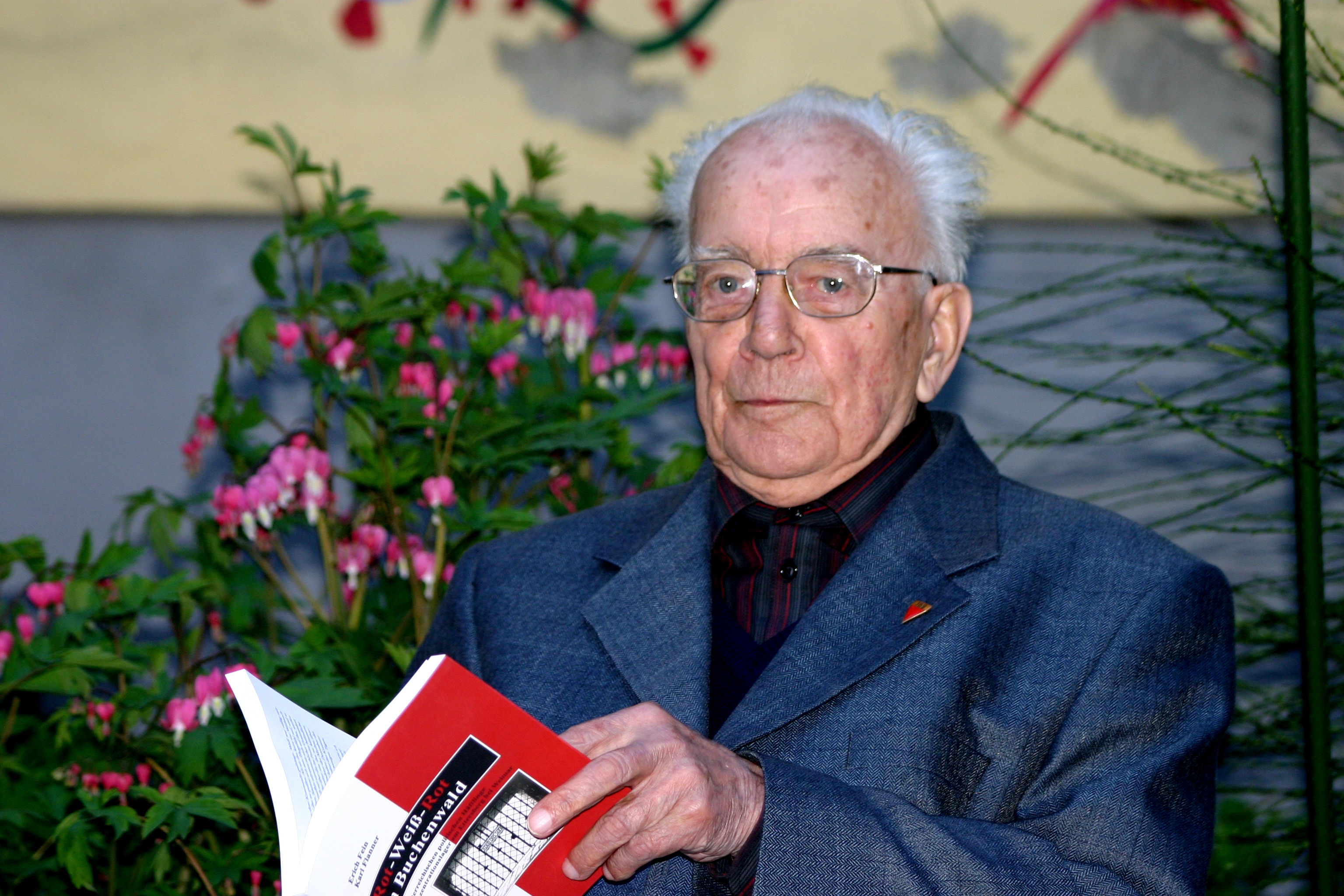 Historiker, Soziologe, Buchautor und Zeitzeuge Professor Karl FLANNER (Wiener Neustadt) mit seinem neuen Buch „Rot-Weiß-Rot in Buchenwald“